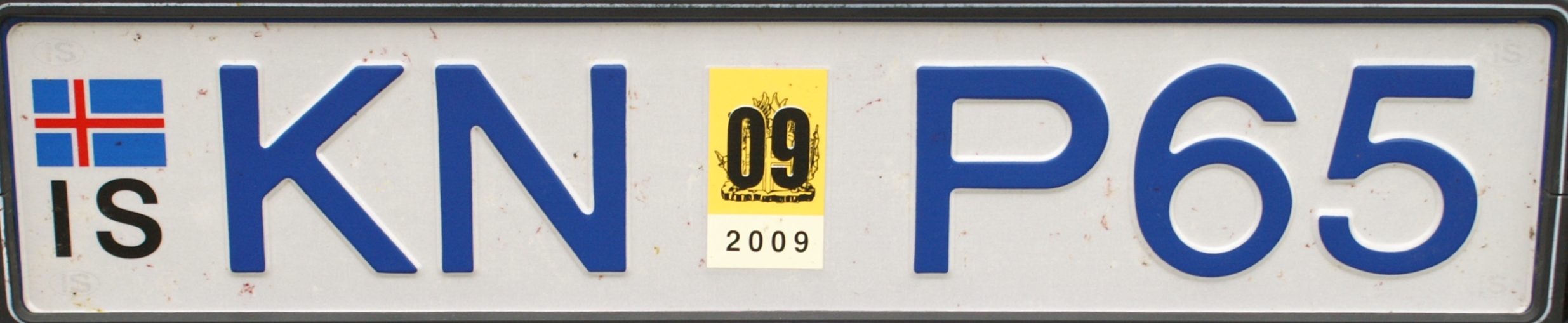 Iceland licenseplate